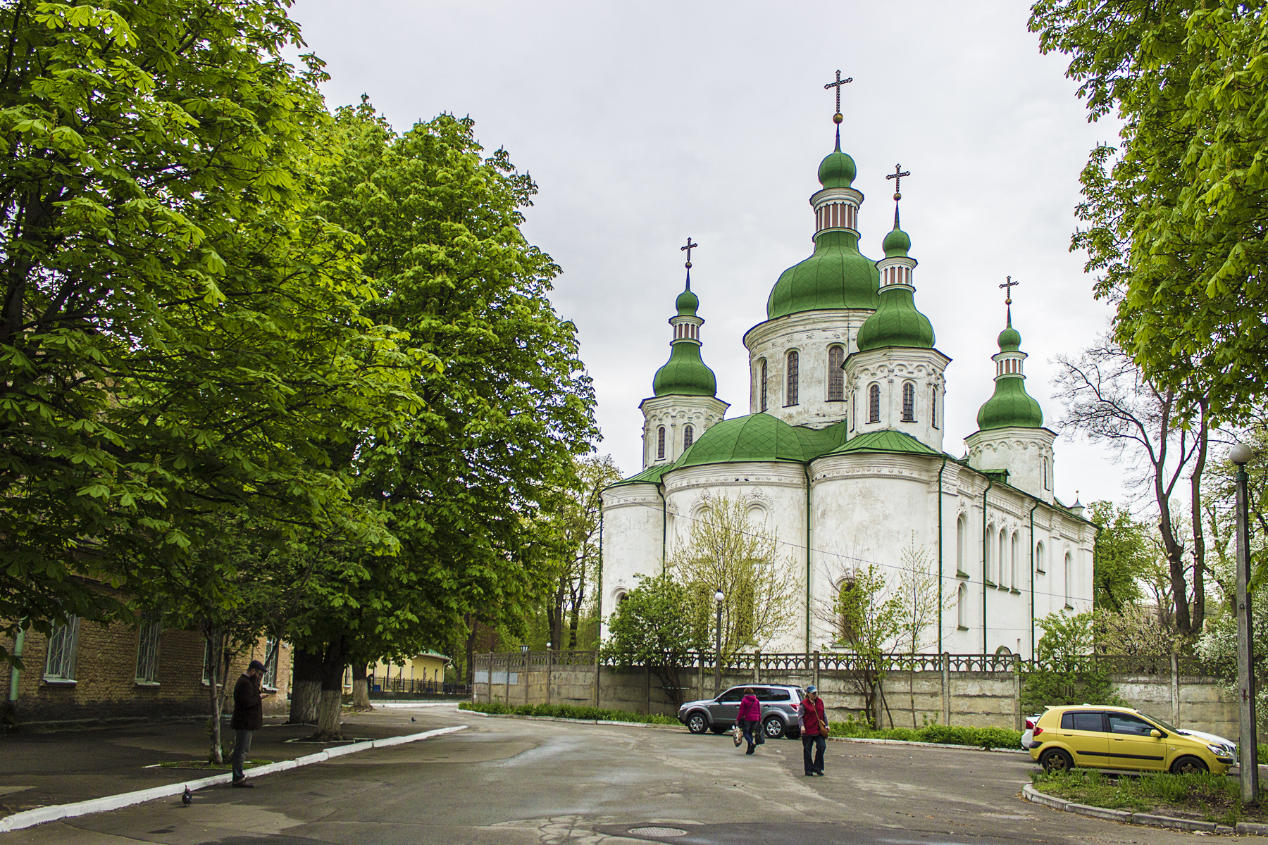 Кирилівська церква, Київ, Теліги Олени вулиця, 12 (Кирилівська вул. (кол. Фрунзе), 103